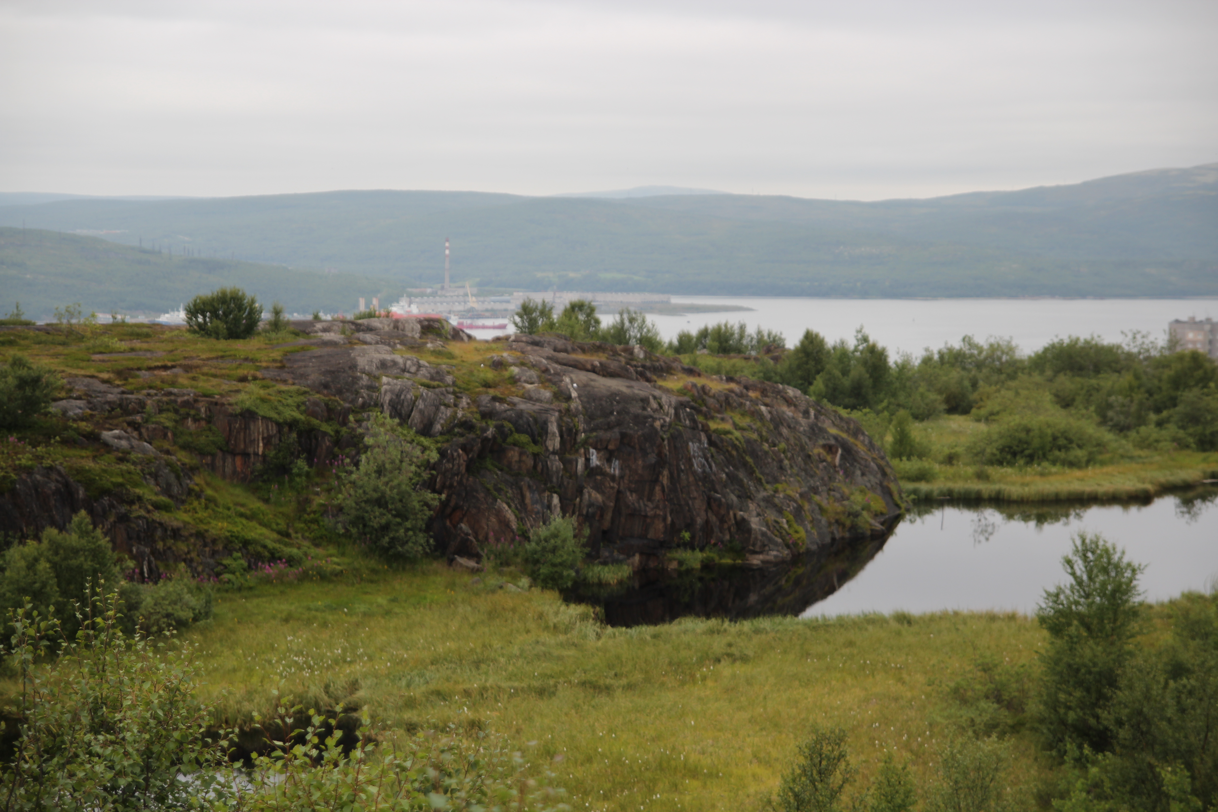 Бараний лоб в Мурманске